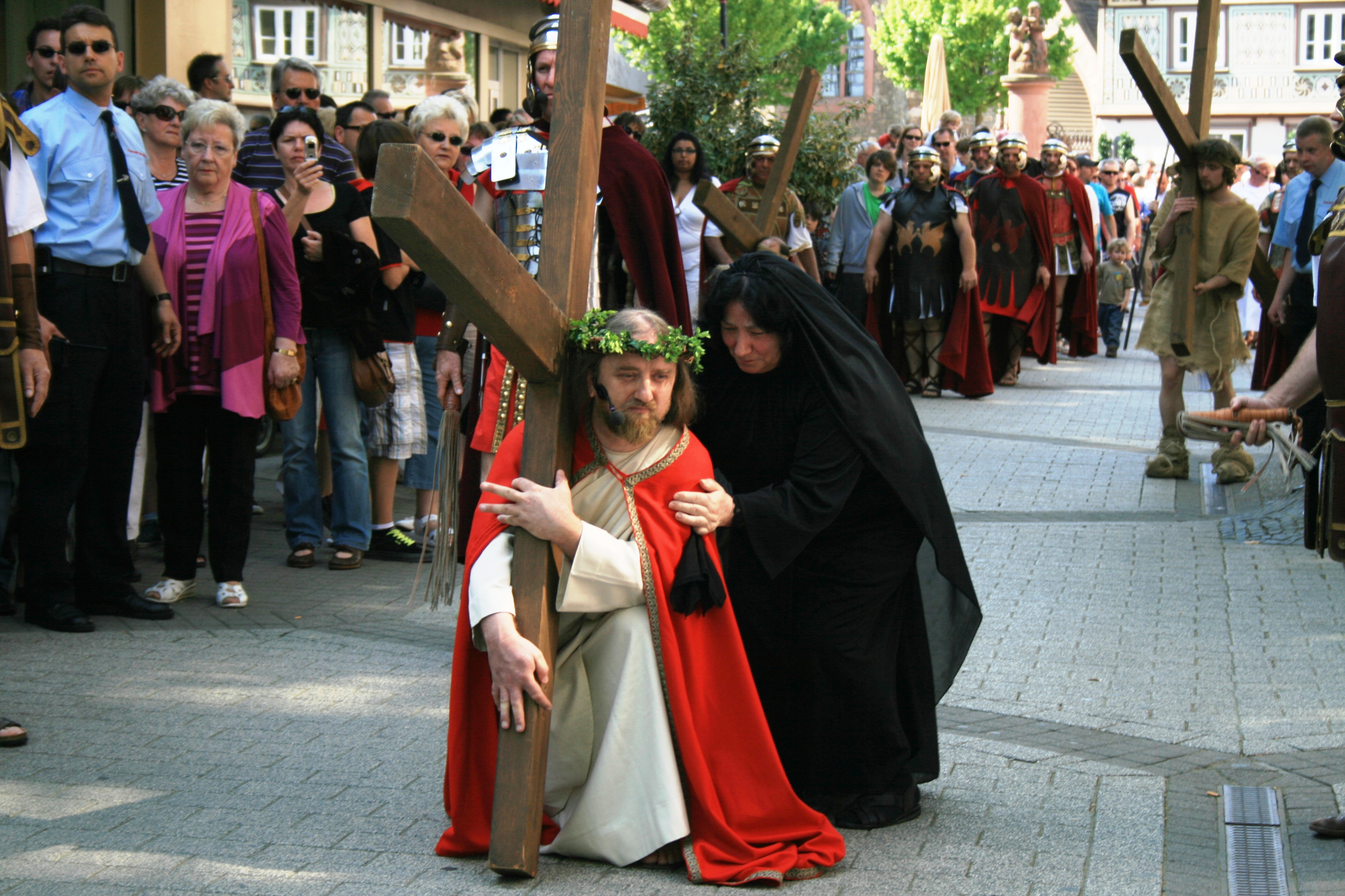 Jesus_Maria_Kreuzweg_Bensheimer_Passionsspiel_2012